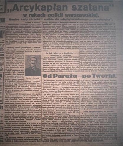 Газетная статья. Заголовки "Верховный жрец Сатаны", "от Парижа до Творки" (психиатр.больница под Варшавой)